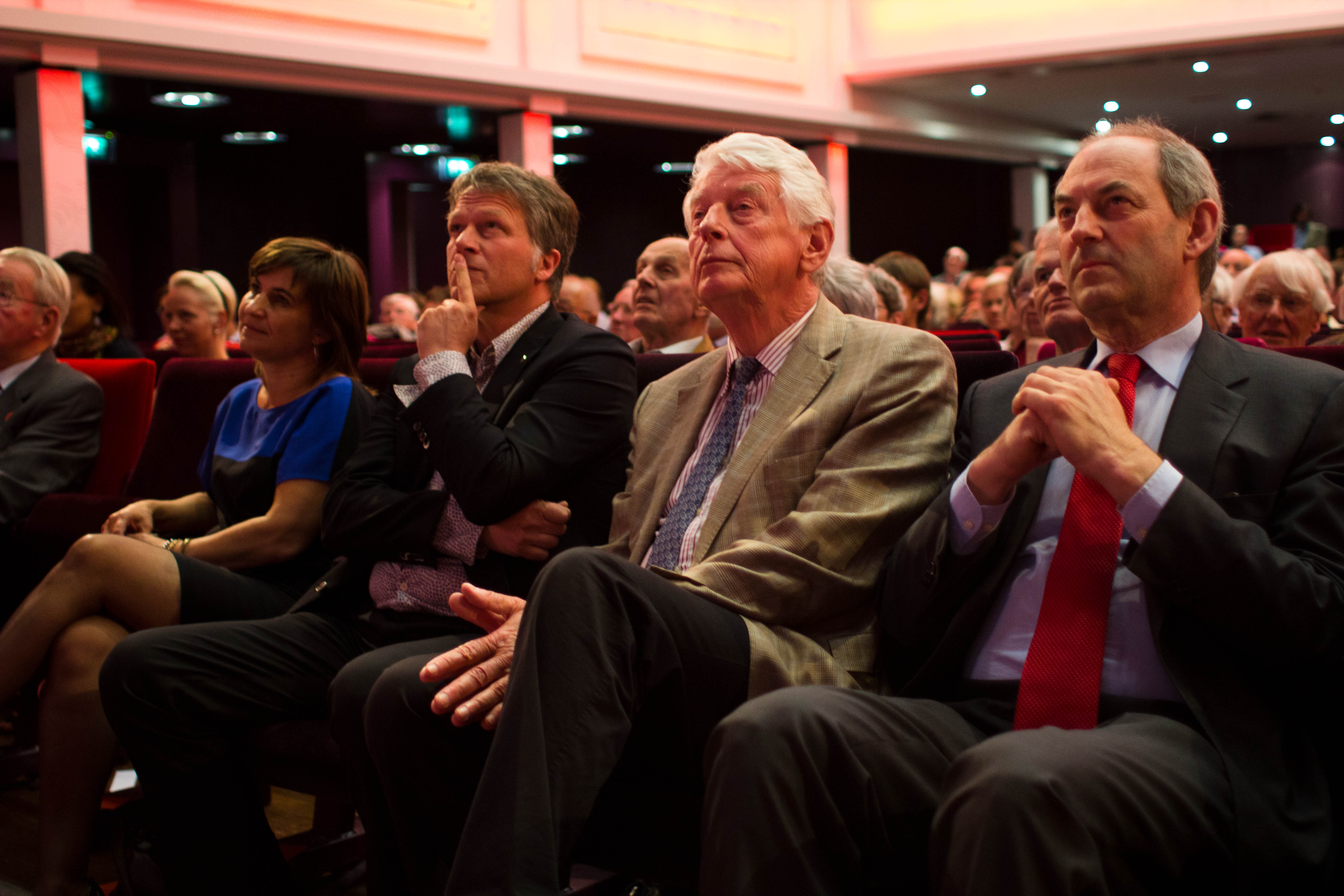 Uitslagenavond Provinciale Statenverkiezingen 2011